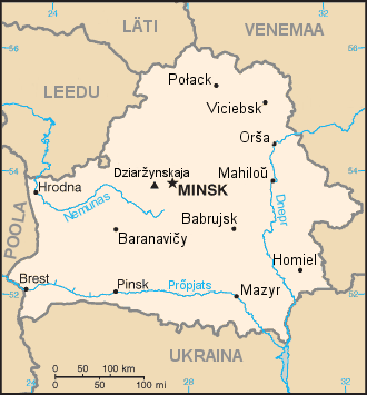 Valgevene kaart